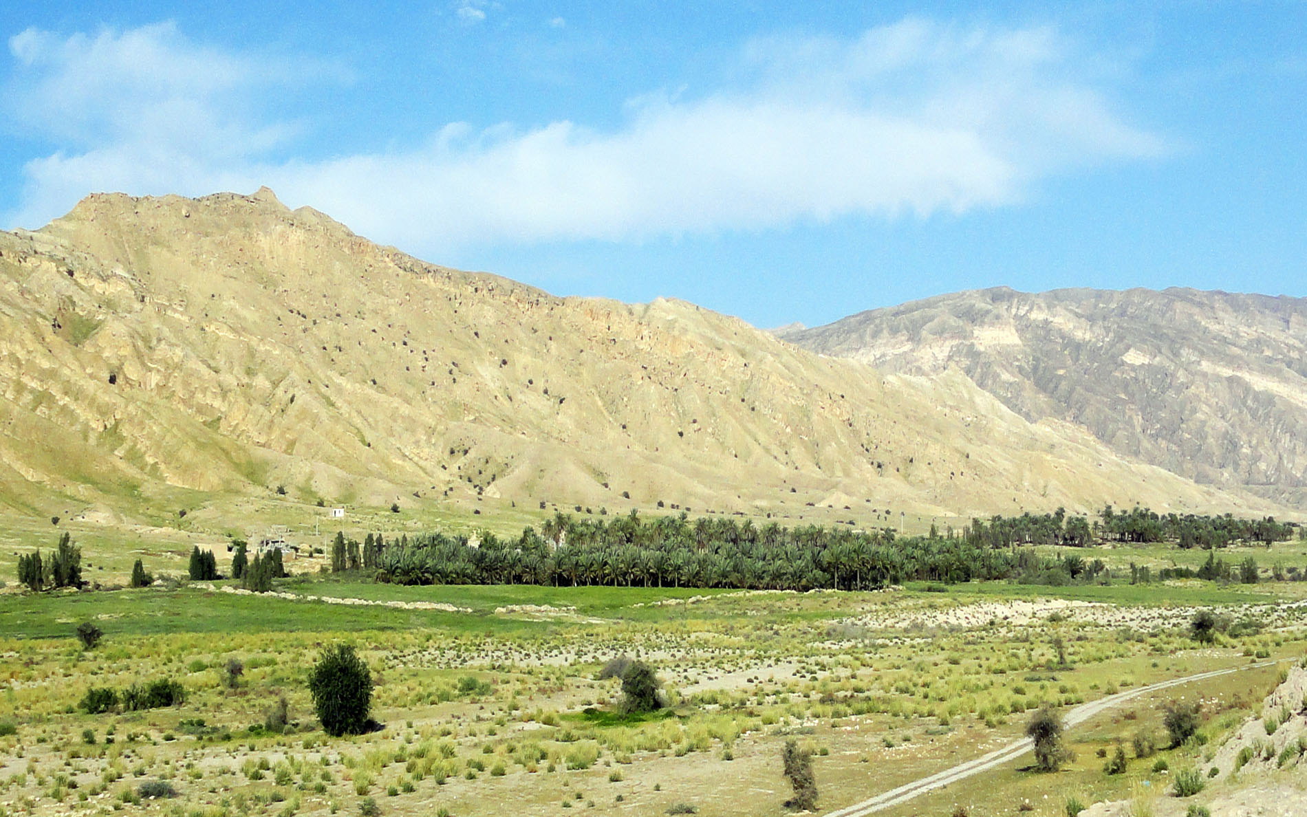 روستای بلبلی، شمال غرب بخش علامرودشت، شهرستان لامرد، استان فارس